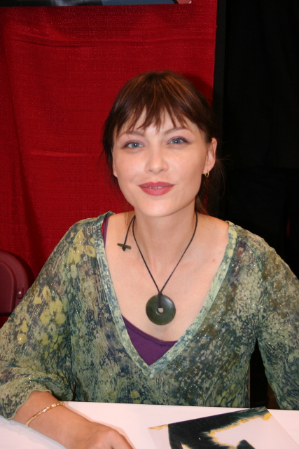 Actress Tamara GorskiTamara Gorski at SFX in Canada